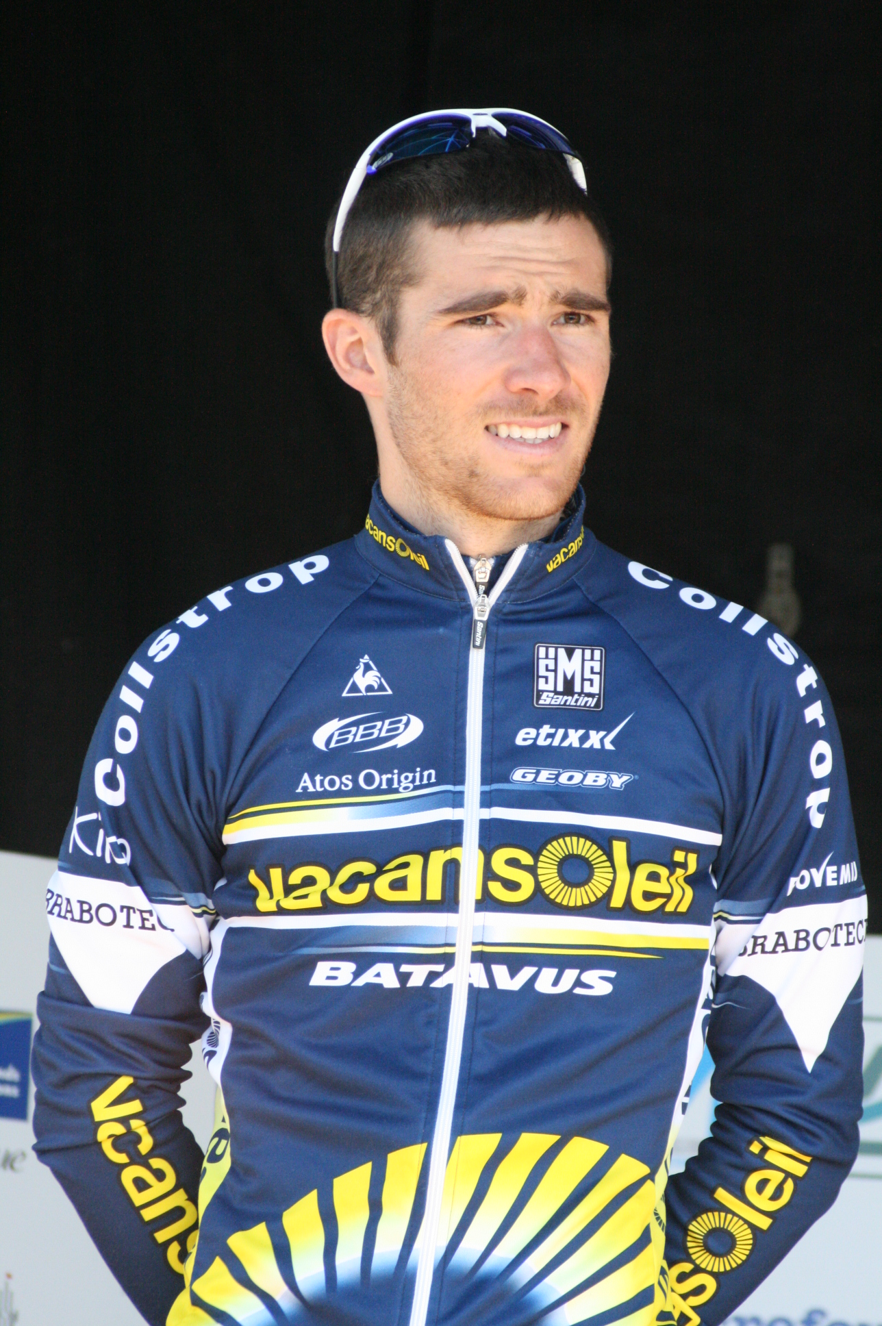 Romain Feillu lors de la présentation des équipes des 4 jours de Dunkerque